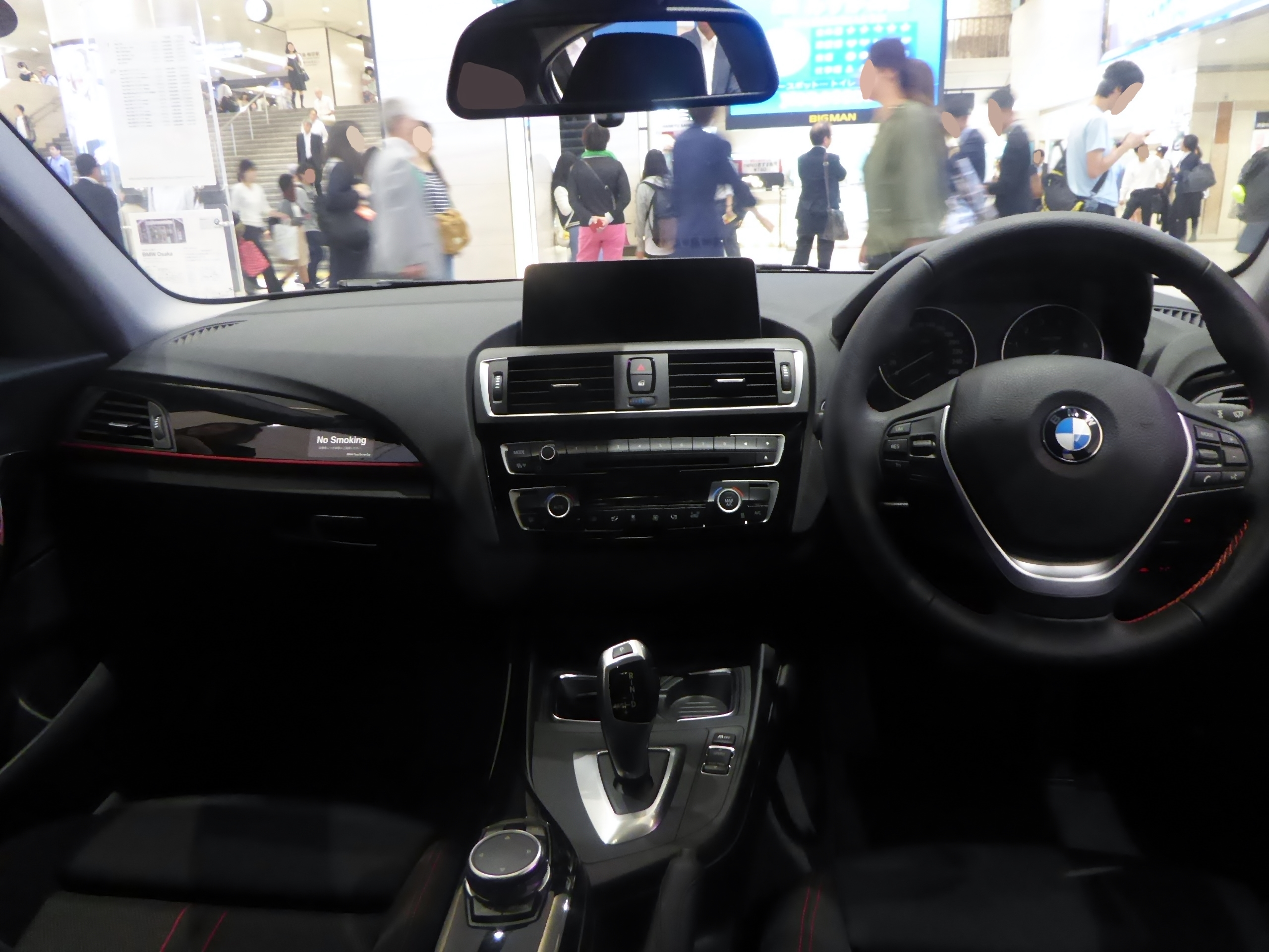 F20型BMW・120iスポーツのインテリアを撮影。